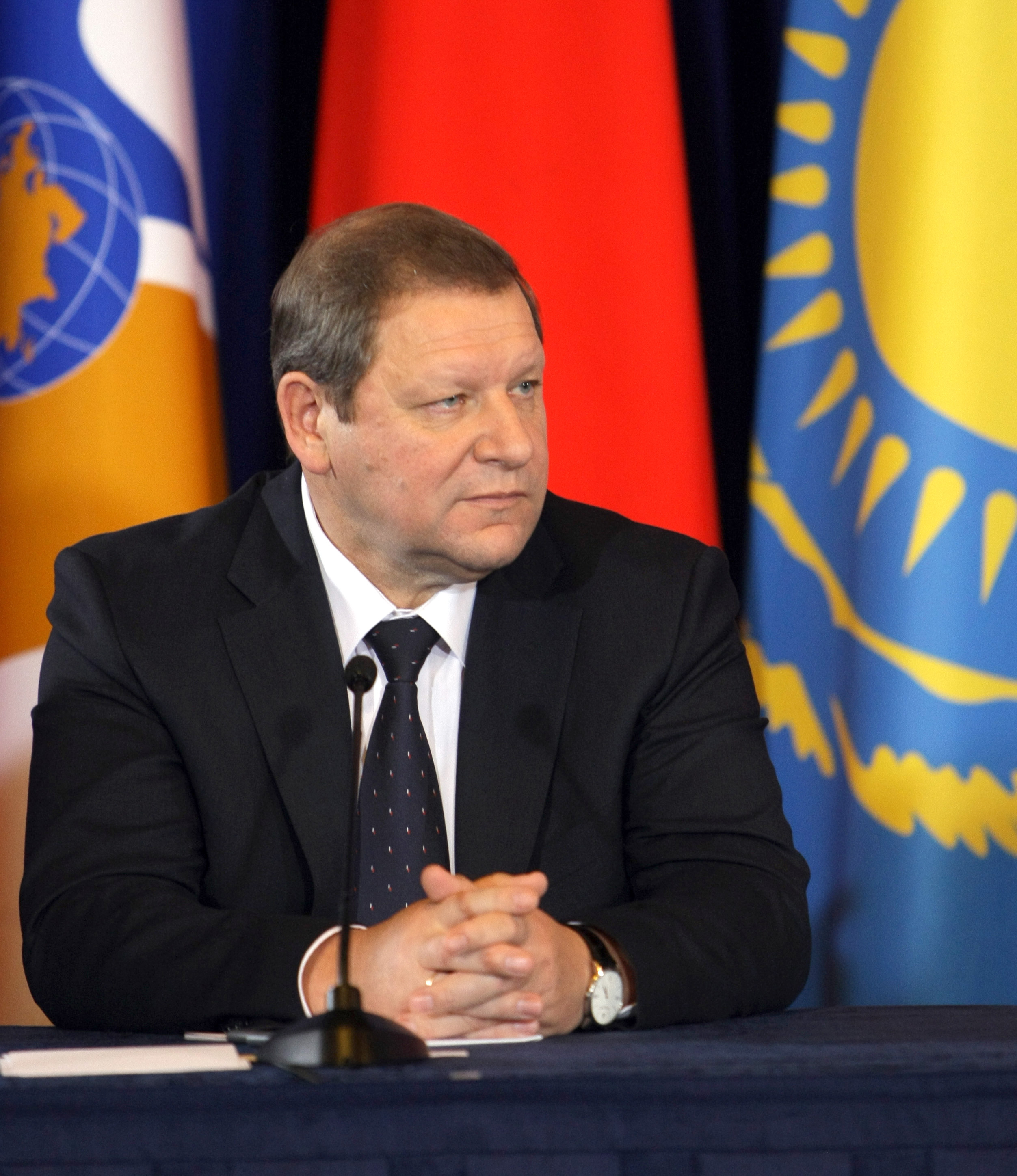 Премьер-министр Республики Беларусь С. С. Сидорский на совместной встрече премьер-министров России, Беларуси и Казахстана